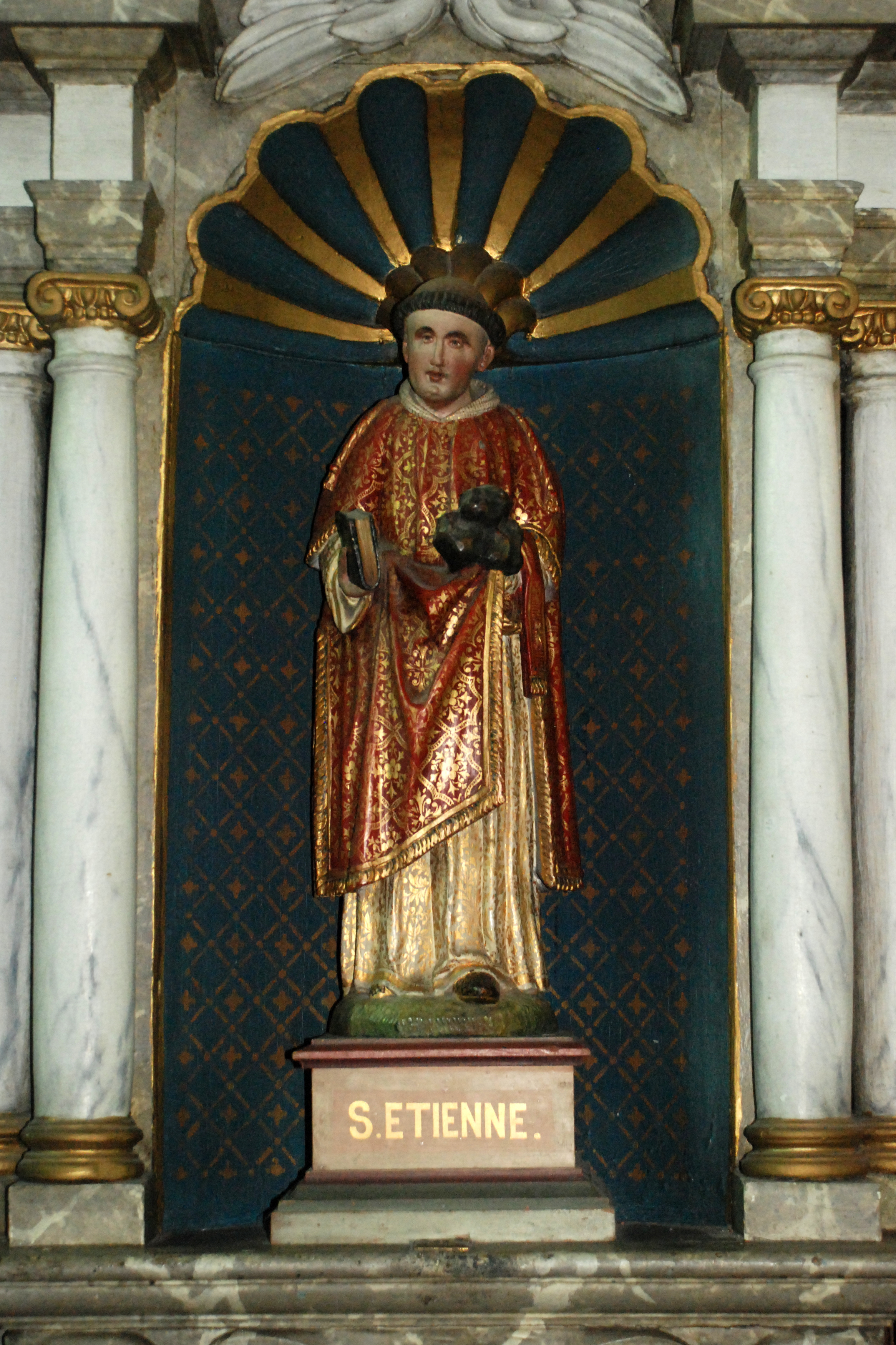 Belgique - Brabant wallon - Église de Court-Saint-Étienne